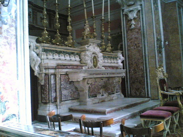 Altare maggiore, Chiesa di Sant'Anna di Palazzo, Napoli